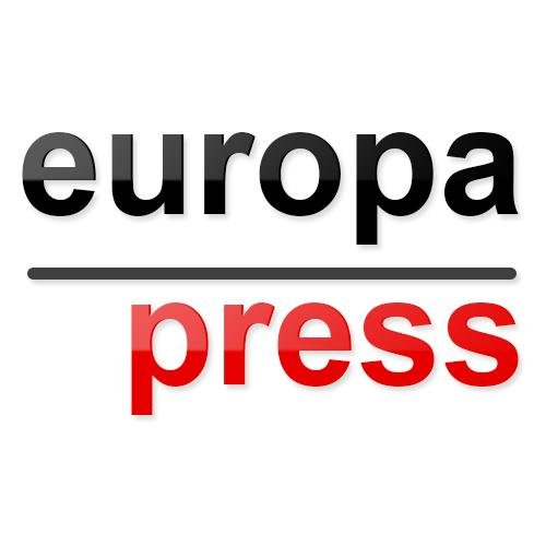 Logo de Europa Press